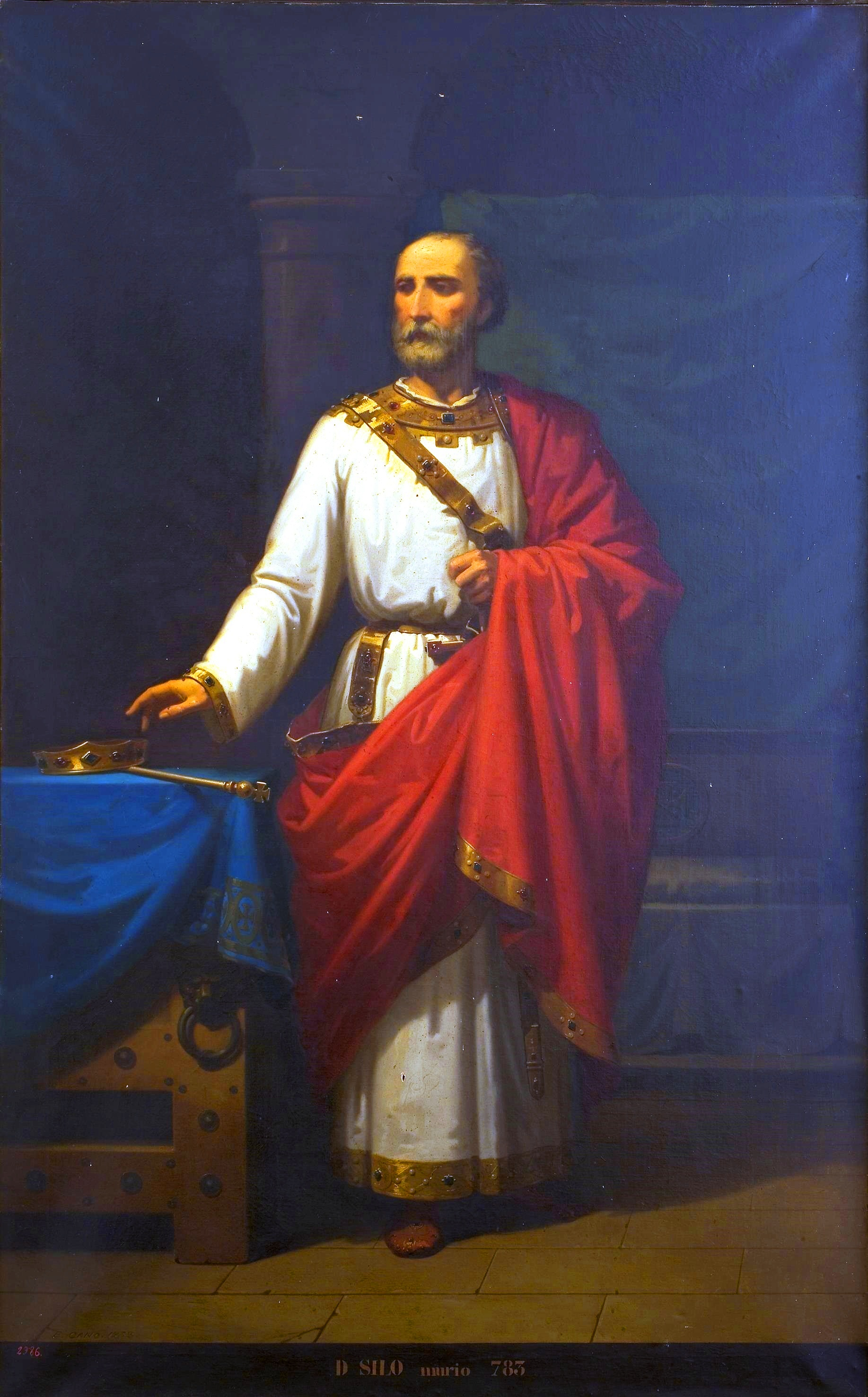 Retrato imaginario de Silo († 783), que llegó a ser rey de Asturias por estar casado con Adosinda, hija del rey Alfonso I el Católico.